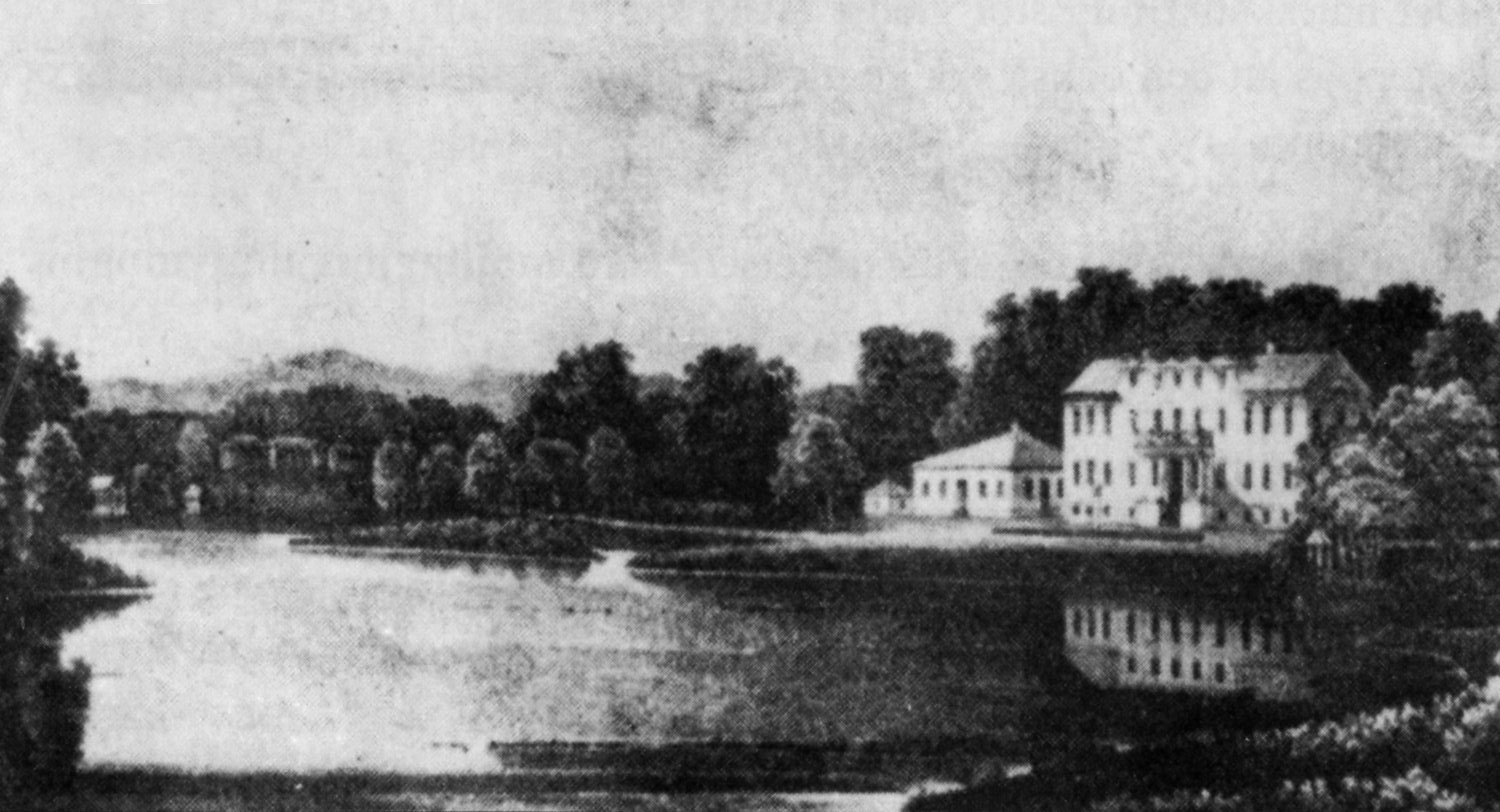 Ålhults herrgård omkring 1820